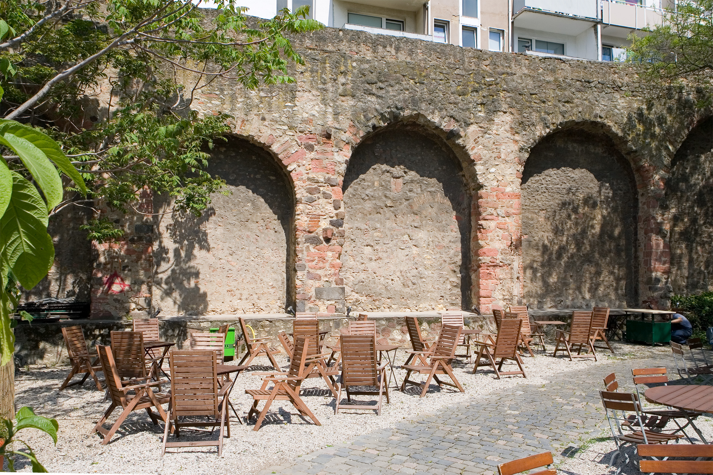 Rest der um 1200 errichteten Staufenmauer in der Altstadt von Frankfurt am Main, die hier zu sehenden romanischen Blendbögen aus Bruchsteinen finden sich direkt westlich des Straßenzuges An der Staufenmauer. Selber fotografiert im Mai 2008, Doppellizensierung GFDL & CC-BY-SA 2.5.